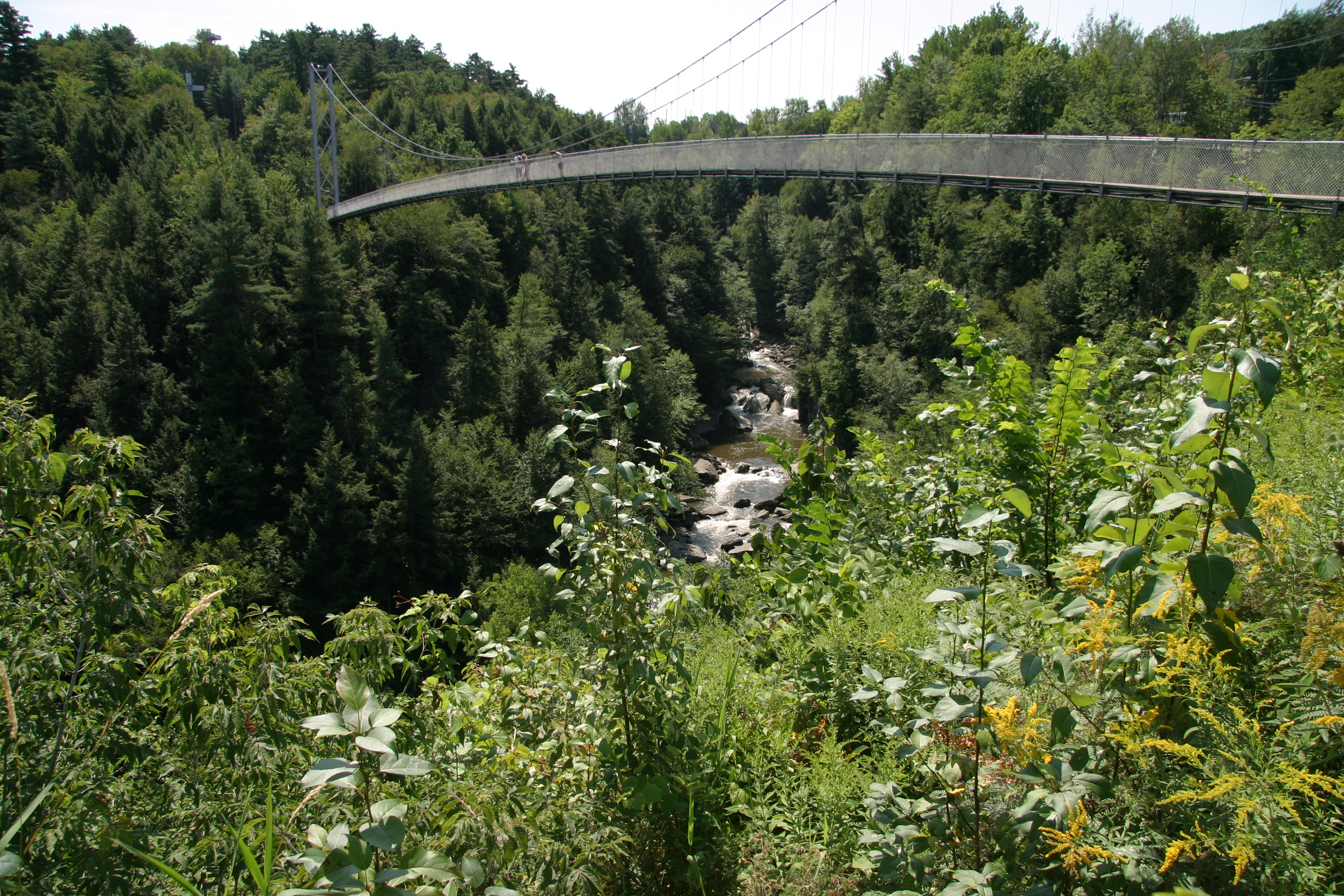 Ponts sur la rivière Coaticook